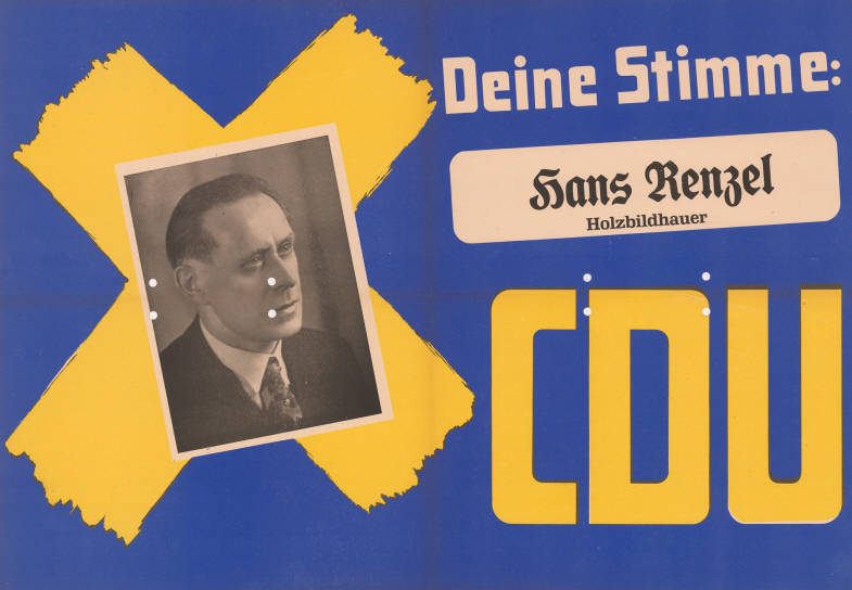 Deine Stimme: Hans Renzel Holzbildhauer CDU Abbildung: Porträtfoto - Stimmkreuz Plakatart: Kandidaten-/Personenplakat mit Porträt Objekt-Signatur: 10-009 : 188 Bestand: Landtagswahlplakate Nordrhein-Westfalen (10-009) GliederungBestand10-18: Landtagswahlplakate Nordrhein-Westfalen (10-009) » Landtagswahl am 18.6.1950 » CDU » mit Porträtfoto Lizenz: KAS/ACDP 10-009 : 188 CC-BY-SA 3.0 DE